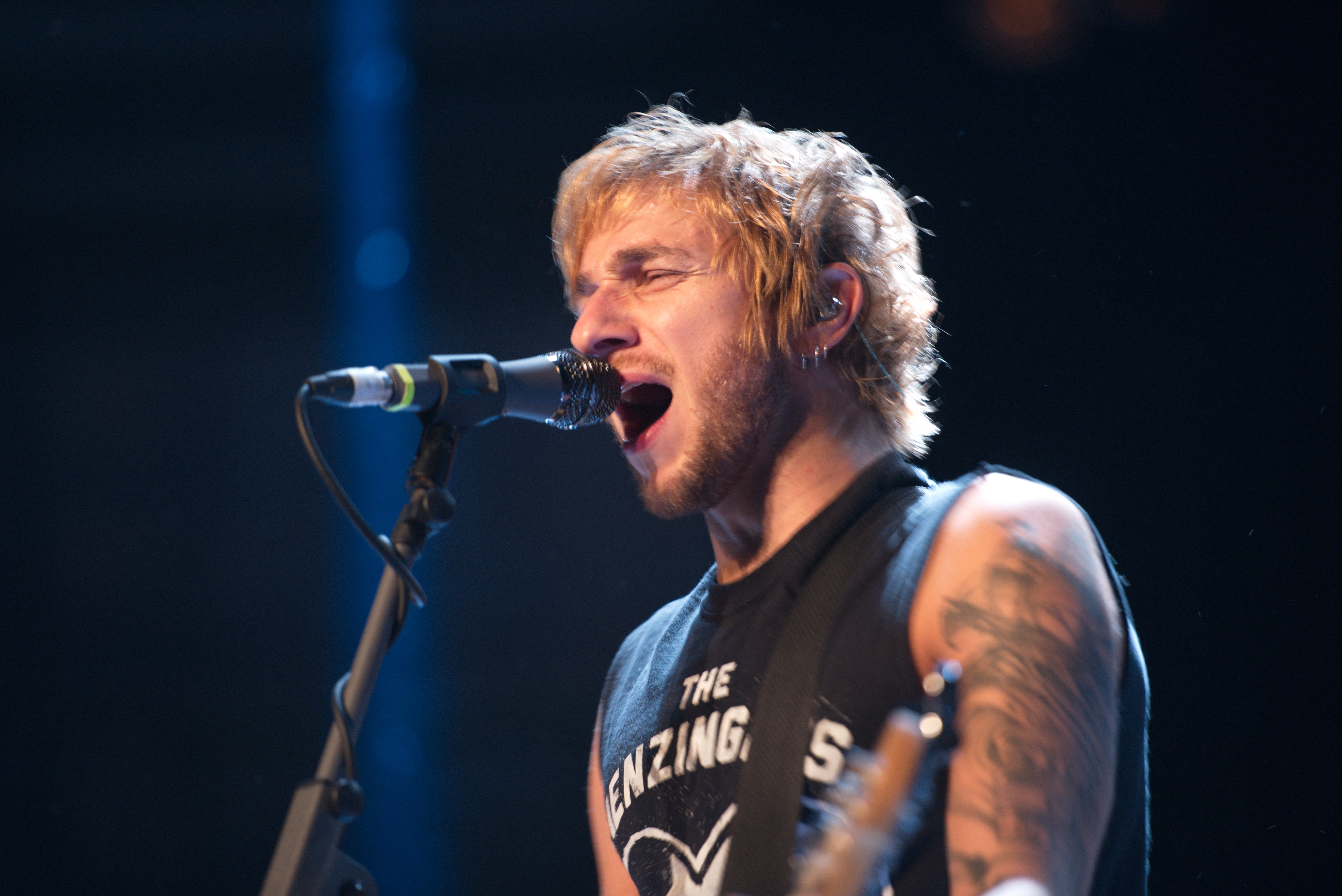 Itchy Poopzkid beim Schüler-Rockfestival 2016